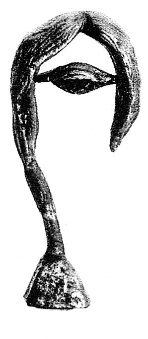 El Premio Florencio Sánchez al teatro otorgado por la Asociación de Críticos Teatrales del Uruguay. Diseño de Eduardo Yepes.